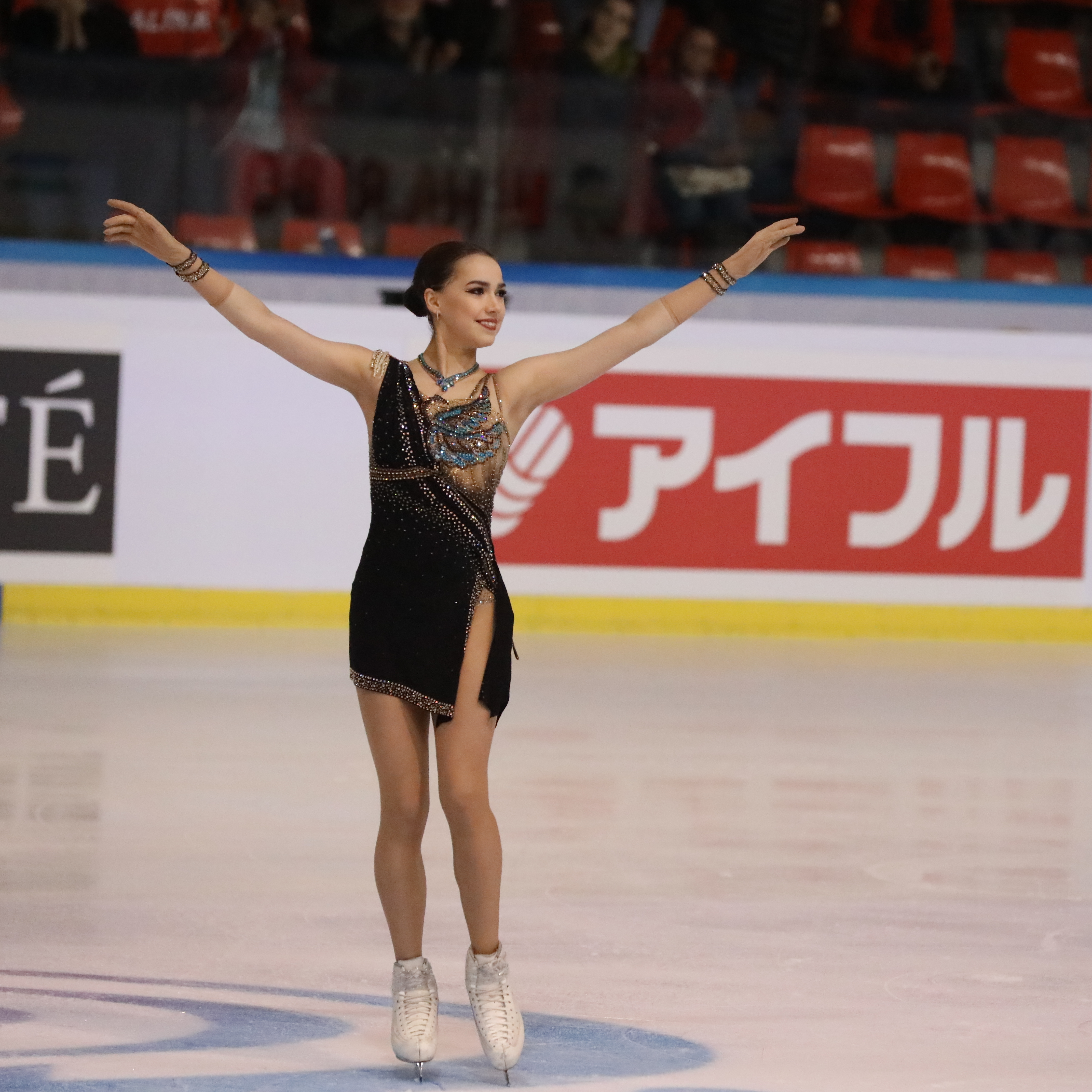 2019 Internationaux de France